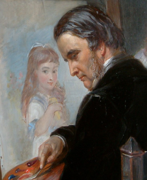 Self-portrait